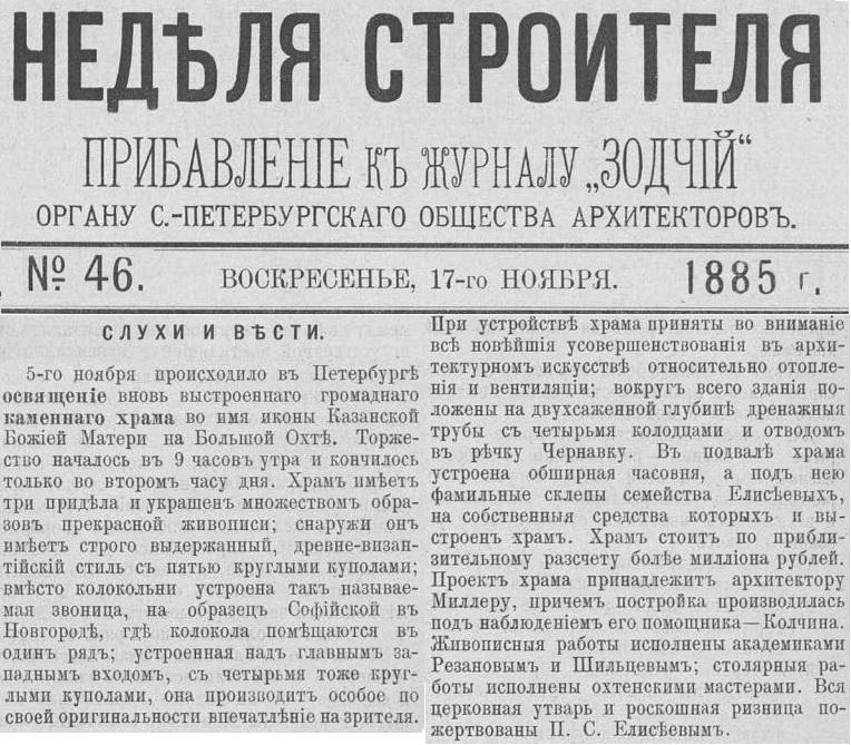 Копия страниц приложения к журналу "Зодчий"